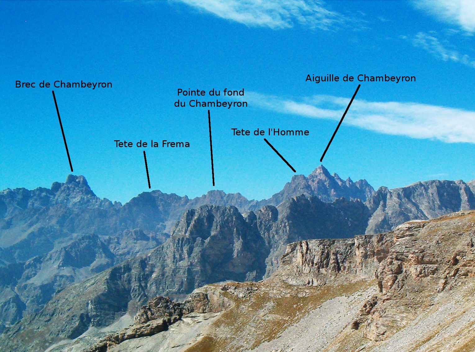 Il gruppo dello Chambeyron valle Maira - valle dell'Ubaye visto da est, con indicazione delle vette principali